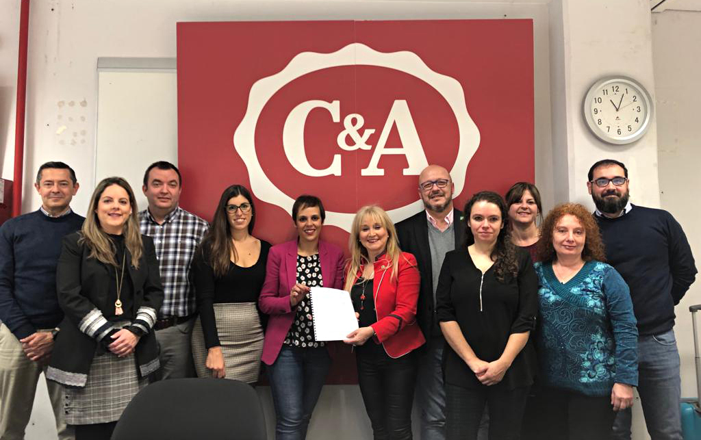 Firma del plan de igualdad de C&A con Fetico